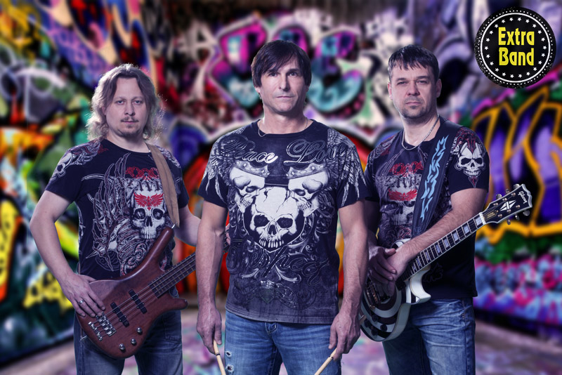 Extra Band